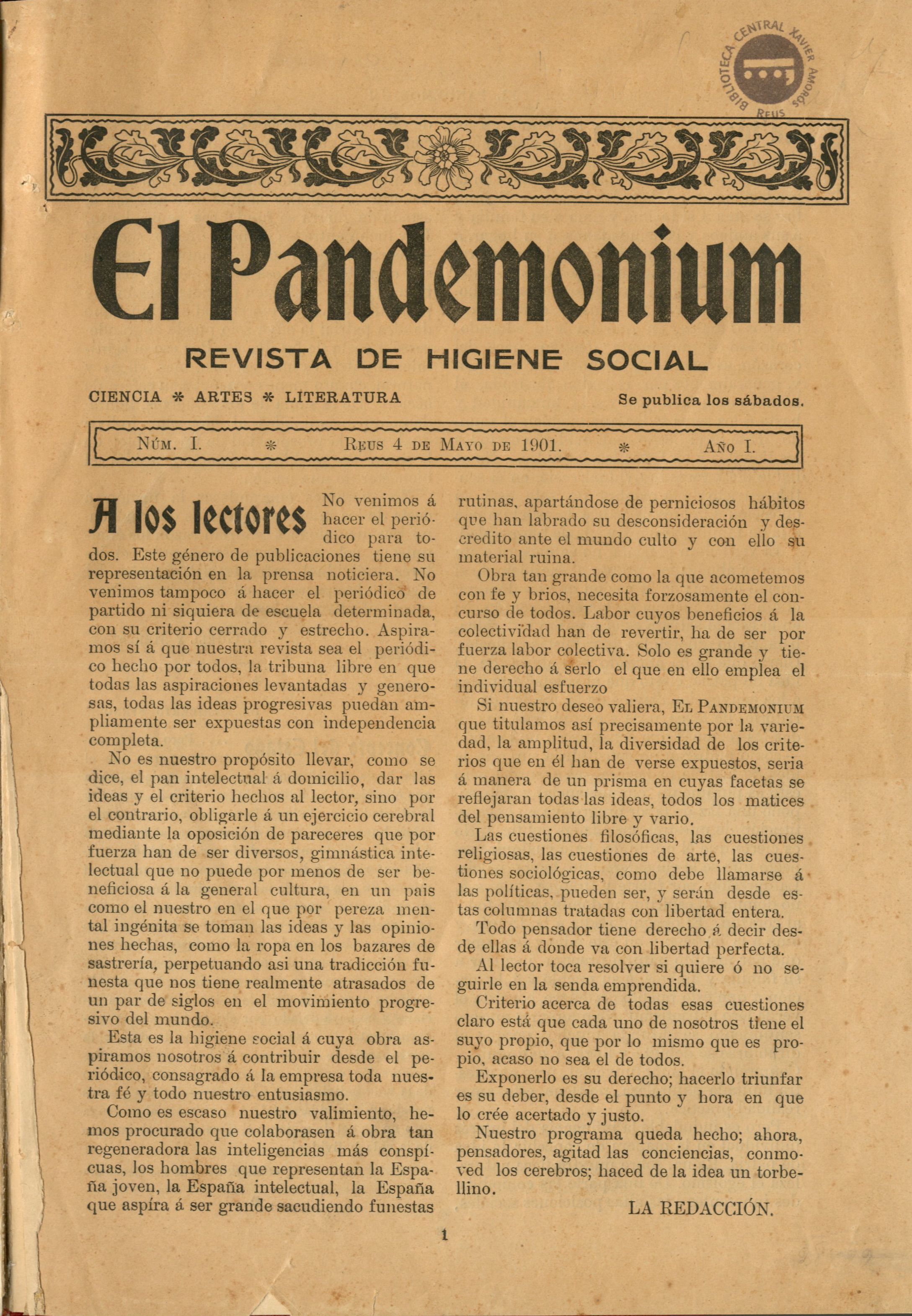 Número 1 de El Pandemonium